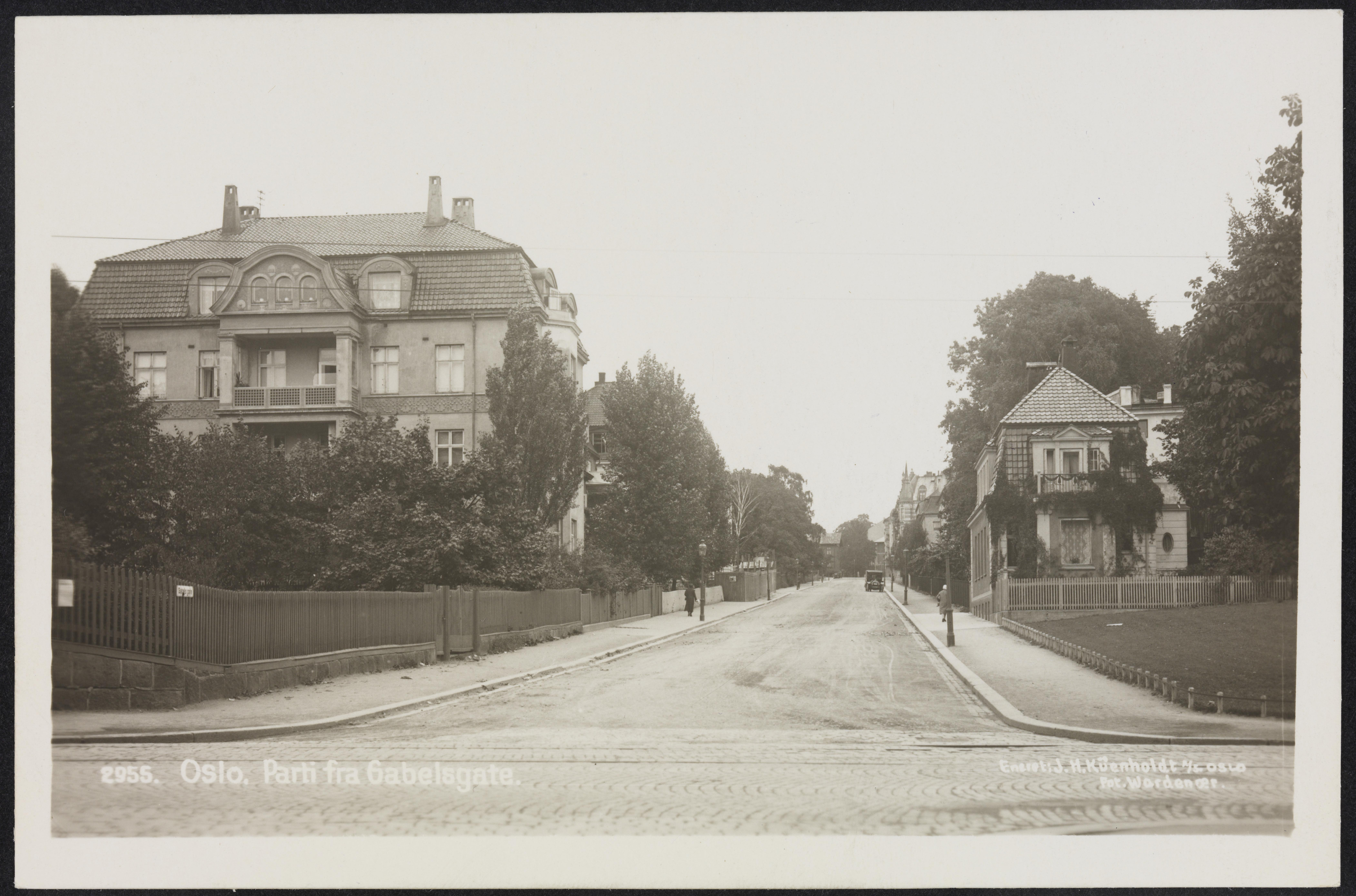 Bildet er hentet fra Nasjonalbibliotekets bildesamling Gabels gate, Skillebekk, Oslo, sett nordover fra Drammensveien.